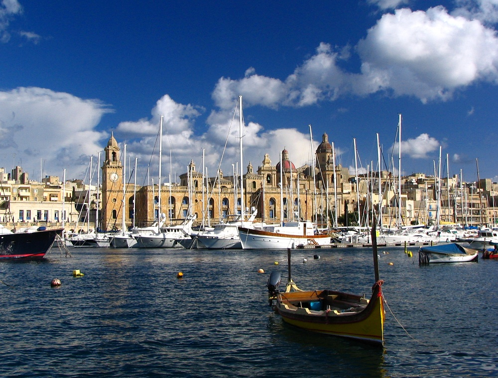 Zatoka i Muzeum Marynistyczne